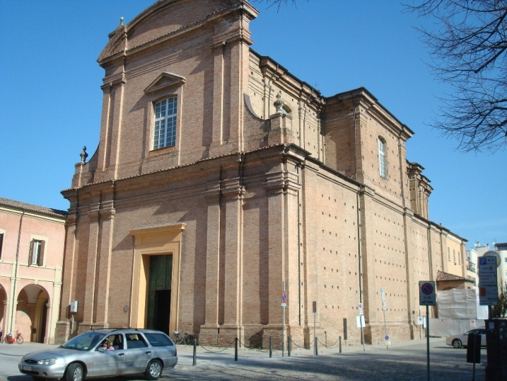 Cesena (Italie), façade avant de la basilique San Domenico